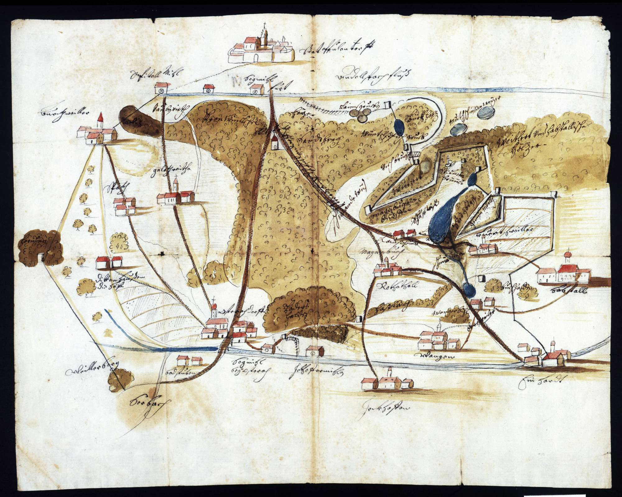 Deutschland (D) - Baden-Württemberg (BW) - Landkreis Sigmaringen (SIG): Beschreibung des ostrachischen Bezirks Archivaliensignatur: Landesarchiv Baden-Württemberg, Abt. Staatsarchiv Sigmaringen, K I O/10 Alt-/Vorsignatur: Ho 158 T 2 B 11 Nr. 1 (Pk. 105) Maße: 31,5 x 40 cm (Höhe x Breite) Bemerkungen: Zugehörige Akten: Ho 158 T 2 B 11 Nr. 1 (Pk. 105) (Beschreibung, Pap., 2 Bl.) Digitalisat im Angebot des Archivs: Online-Findbuch im Angebot des Archivs